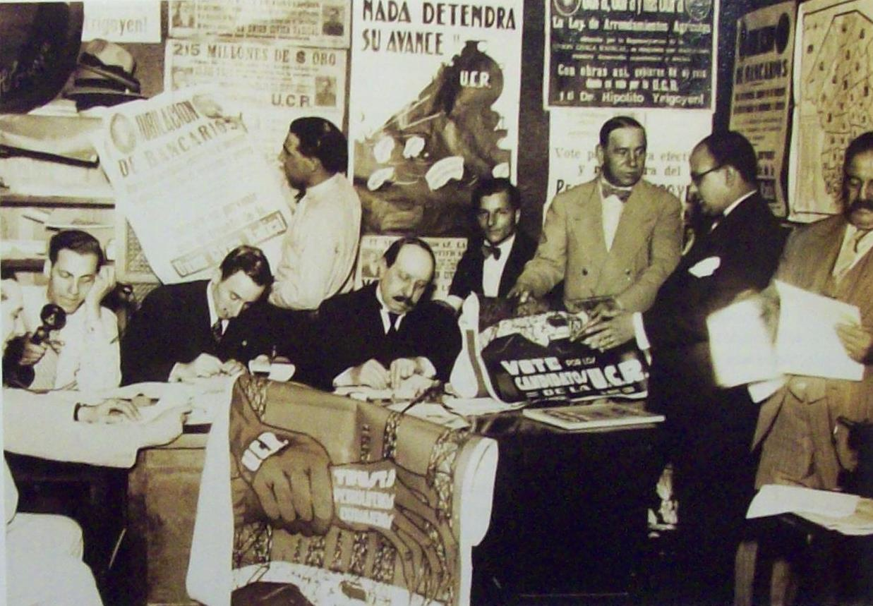 Elecciones para diputados y senadores (1913).